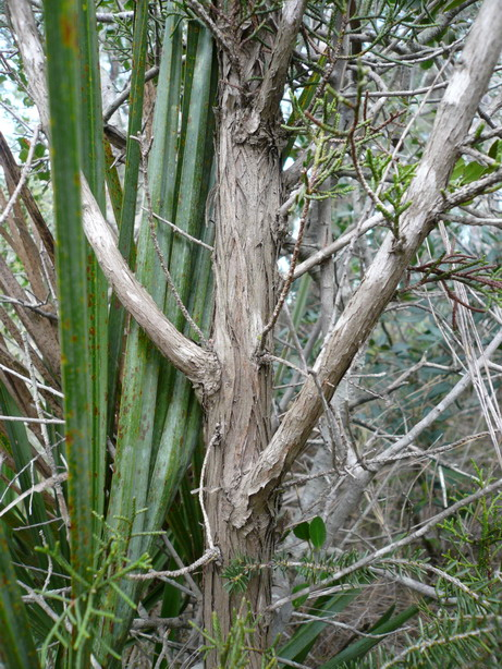 Margalló (Chamaerops humilis) i savina (Juniperus phoenicea). Canyelles (Garraf, Catalonia)